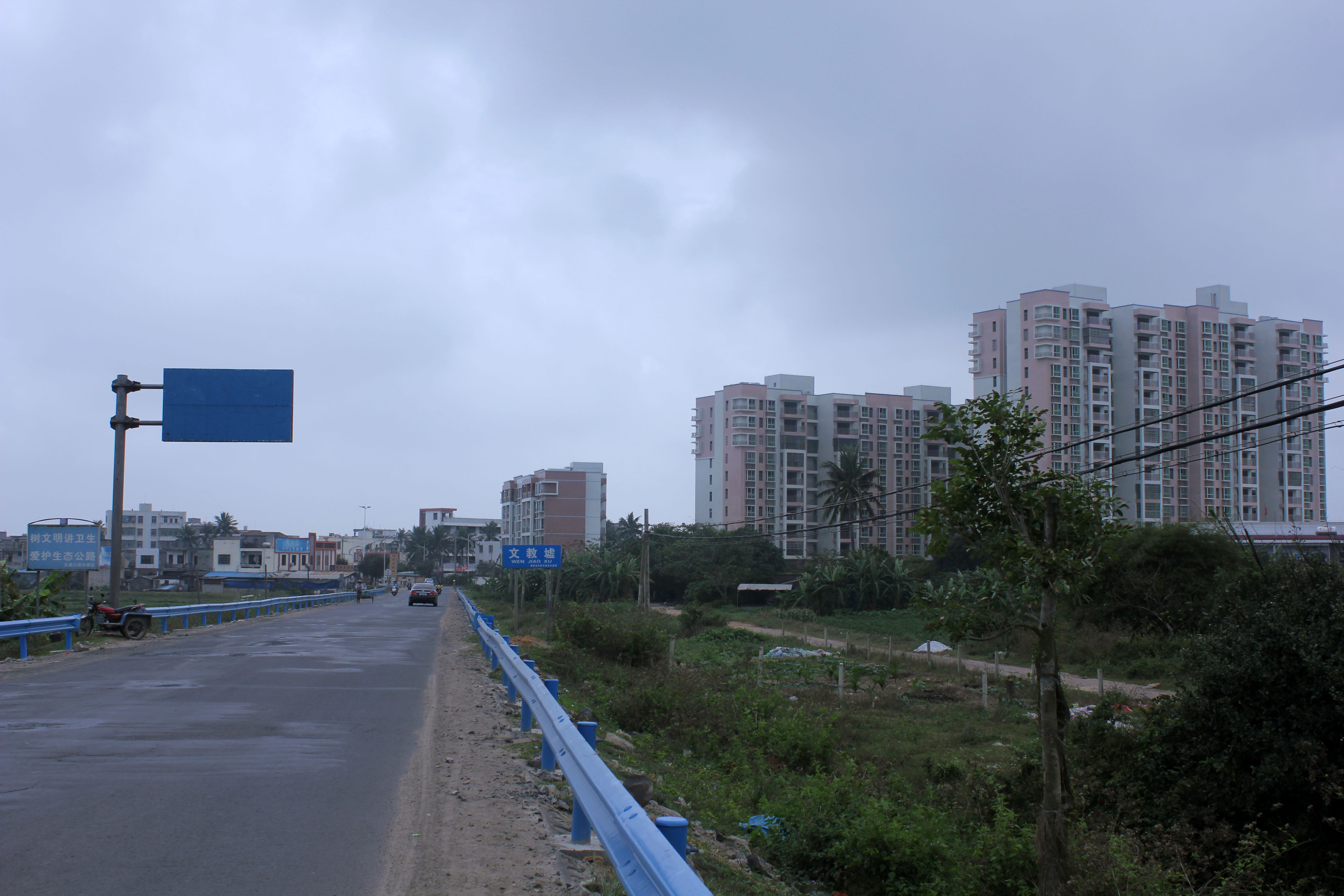 中国海南省文昌市文教镇。